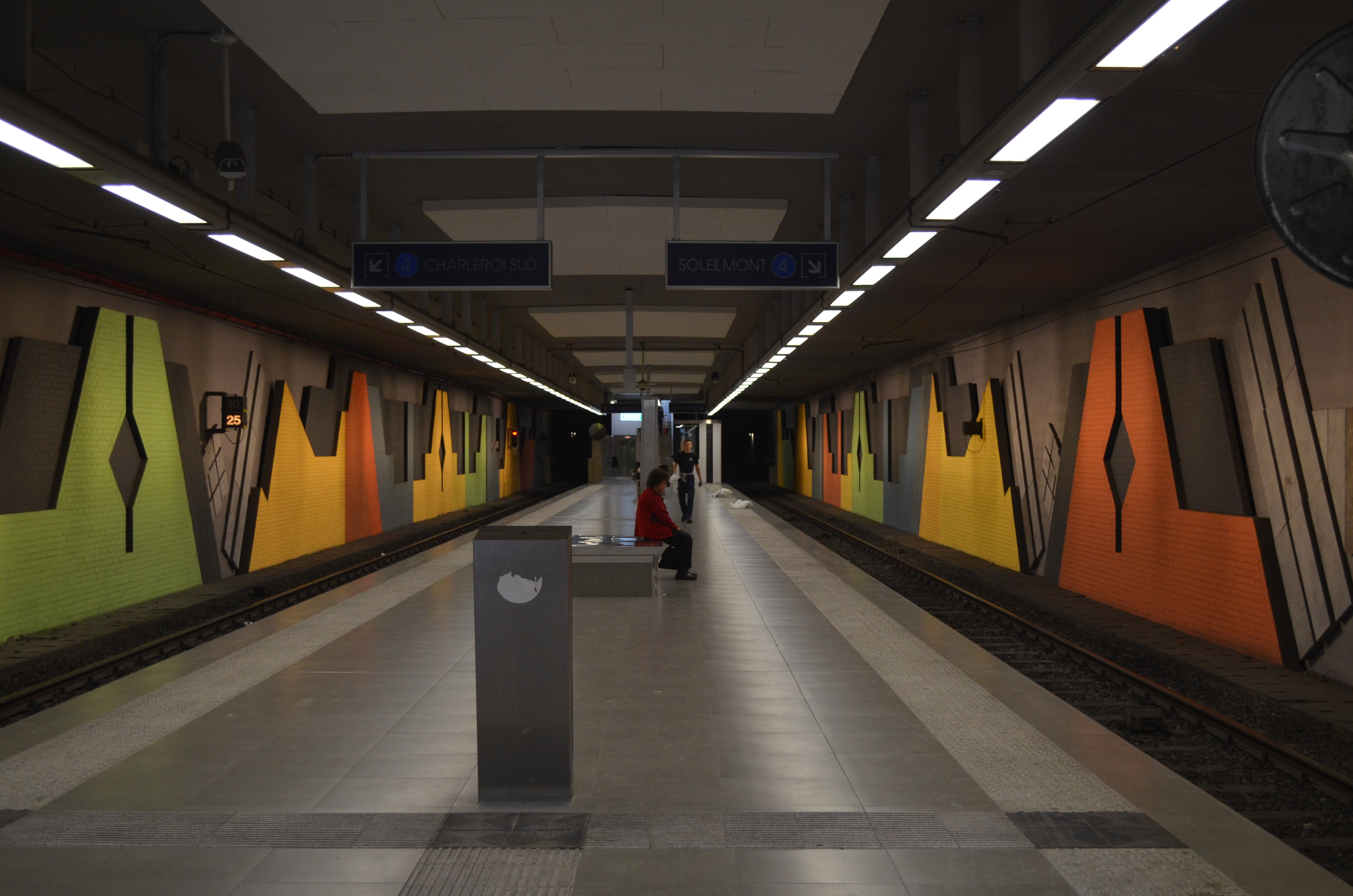 Station Samaritaine sur la ligne 4 du Métro léger de Charleroi.